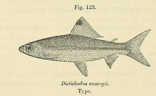 Paradistichodus dimidiatus